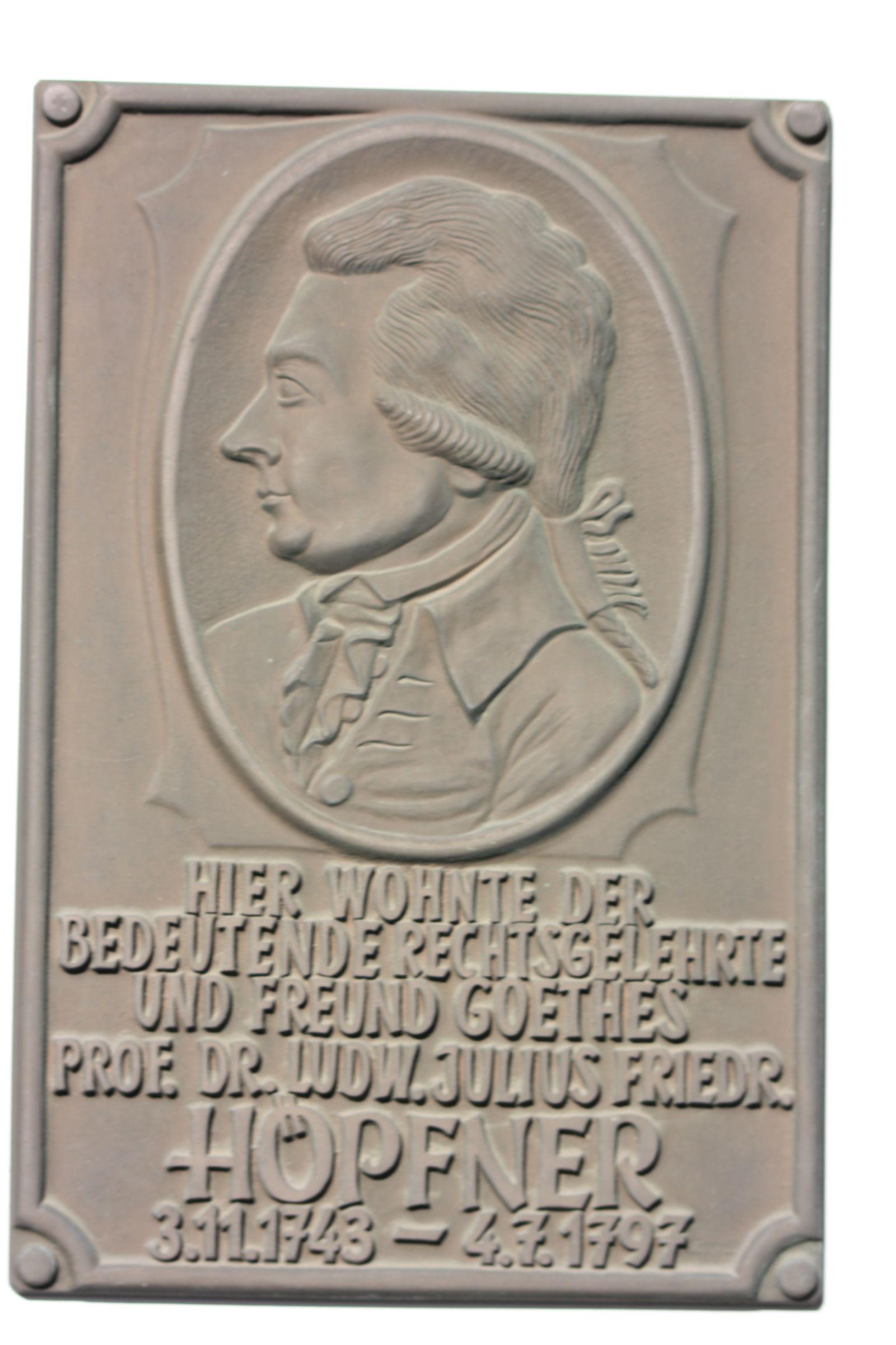 Gedenktafel für Ludwig Julius Friedrich Höpfner in Gießen, Hessen